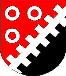 Lehtse valla vapp